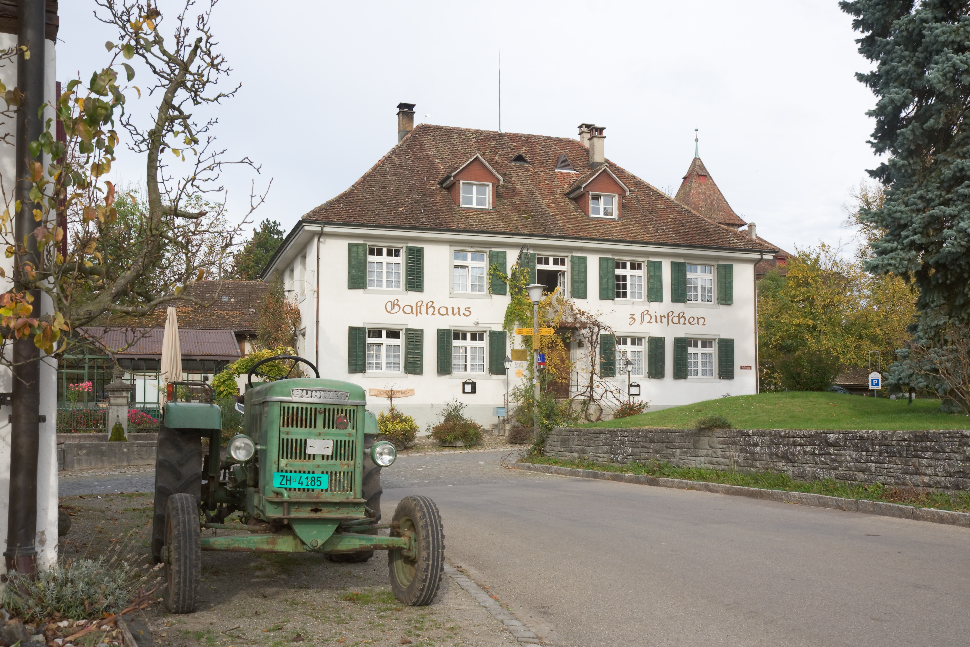 Der Gasthof «zum Hirschen» in Kyburg (Schweiz), erbaut 1819. Im Vordergrund ein Traktor von Bührer.